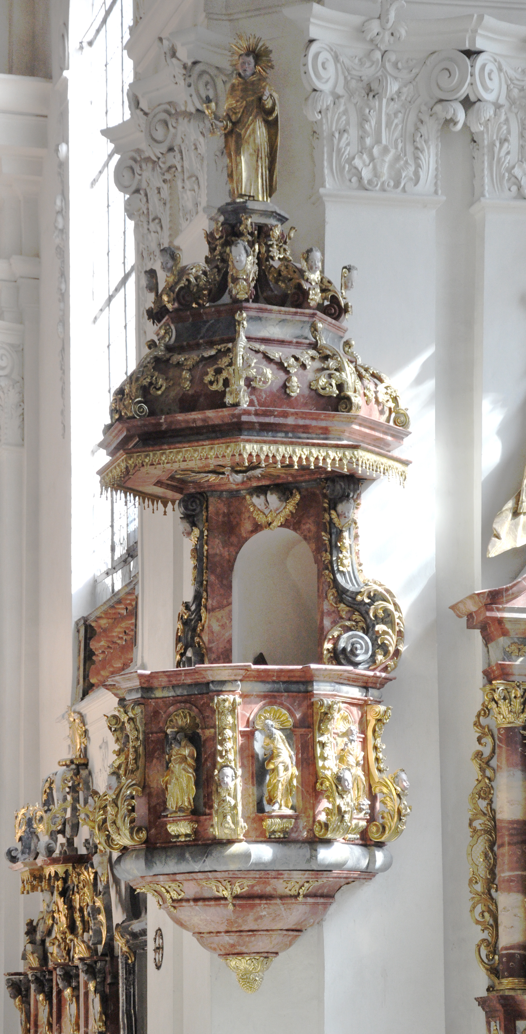 Kloster Sankt Katharinental (Diessenhofen), Klosterkirche